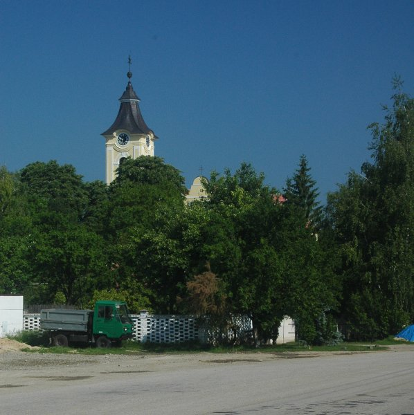 Cirkev v Petrova Ves.